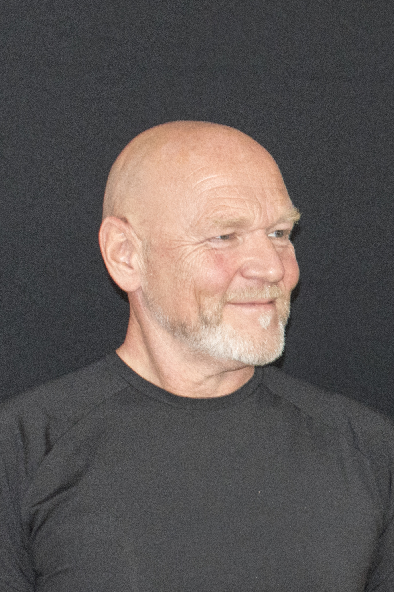 Novinářská konference 13. 9. 2018. Autor: Blanka Borová (Karolína Černá) pro Kritiky.cz